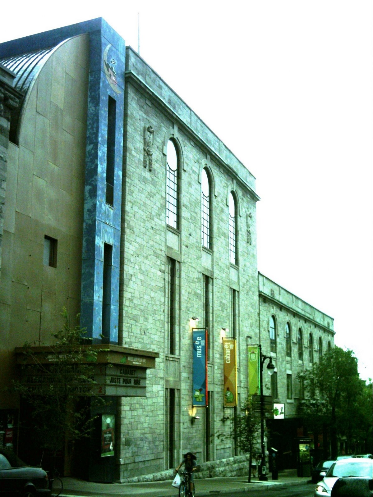 L'édifice Juste pour rire (Musée, Cabaret...), situé boulevard Saint-Laurent à Montréal